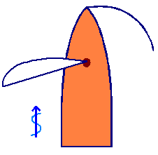 Voor de windse koers met zeil over bakboord.